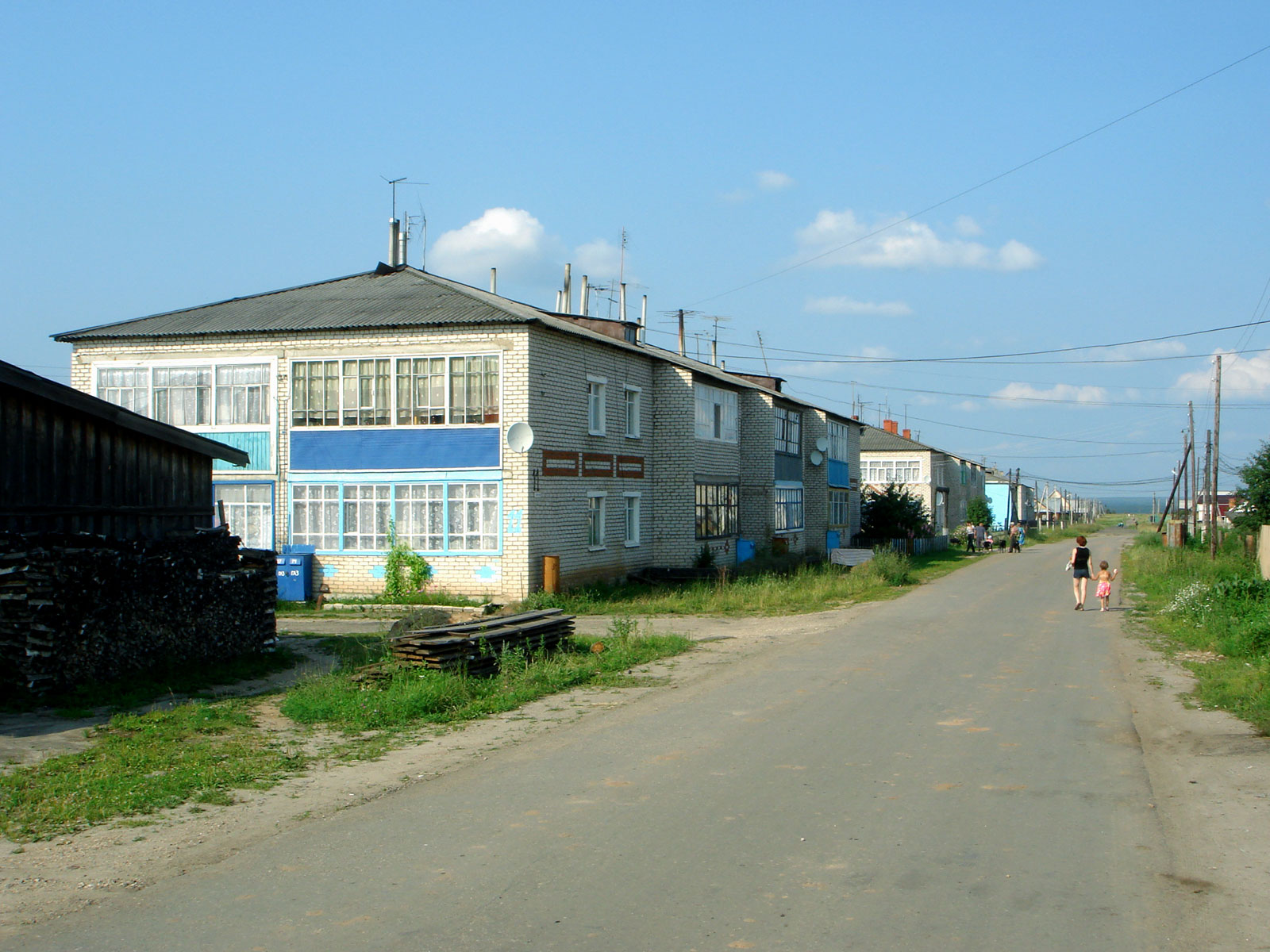 Двухэтажные дома в Варнавине, Нижегородская область, Россия.